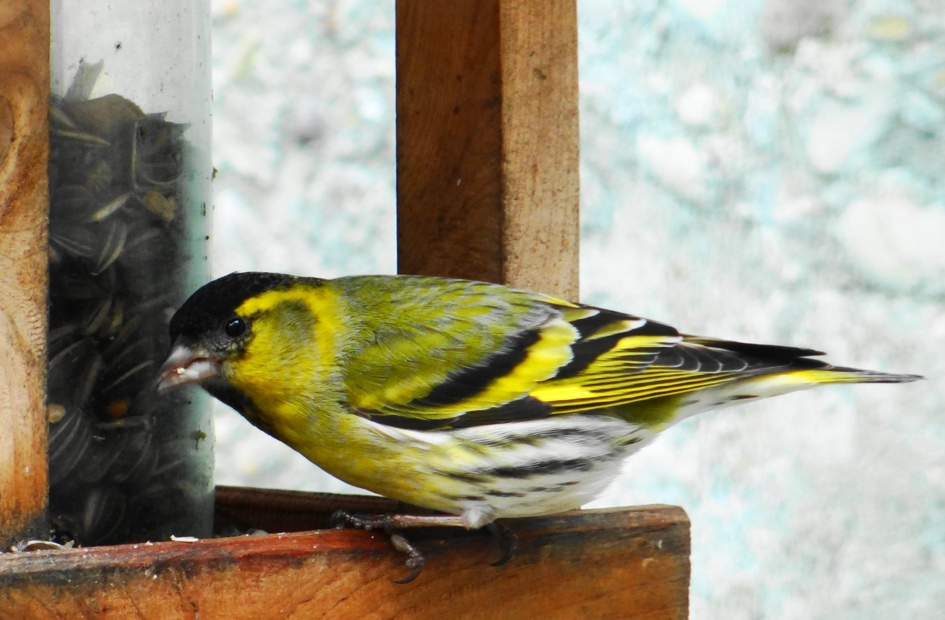 Carduelis spinus mâle en hiver en isère